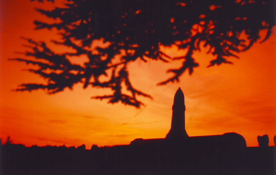 coucher de soleil sur l'ossuaire